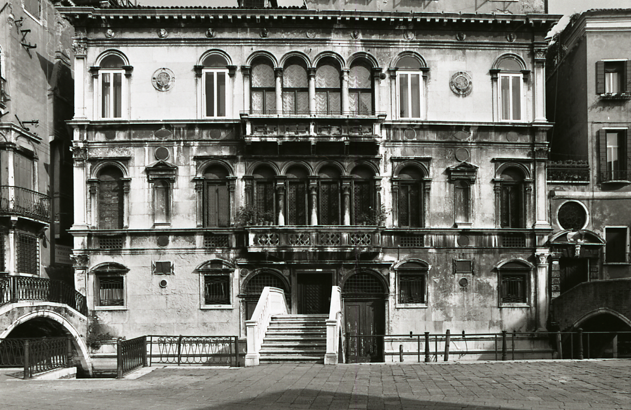 Servizio fotografico : Venezia, 1977 / Paolo Monti. - Strisce: 2, Fotogrammi complessivi: 9 : Negativo b/n, gelatina bromuro d'argento/ pellicola ; 35 mm. - ((Sul portanegativi: N[I]K[MA]T FP4. . - All'interno del portanegativi: la serie è anche identificata da una linea orizzontale a pennarello blu che separa la suddetta serie dalla precedente di soggetto diverso. - Occasione: Pubblicazione (Electa, 1977). - Fonte: Agenda di Paolo Monti: Leica 1501-3000 Controllo numerazione (1950-1978), presso Archivio Paolo Monti. - Fonte: Fattura di Paolo Monti: IV. Commesse/ Fattura n. 05/ Fotografie per volume architetto veneziano Codussi - Prof. Puppi (1977/03/31), presso Archivio Paolo Monti. - Fonte: Monografia di Olivato Loredana, Puppi Lionello: Mauro Codussi, Milano, Electa (1977)